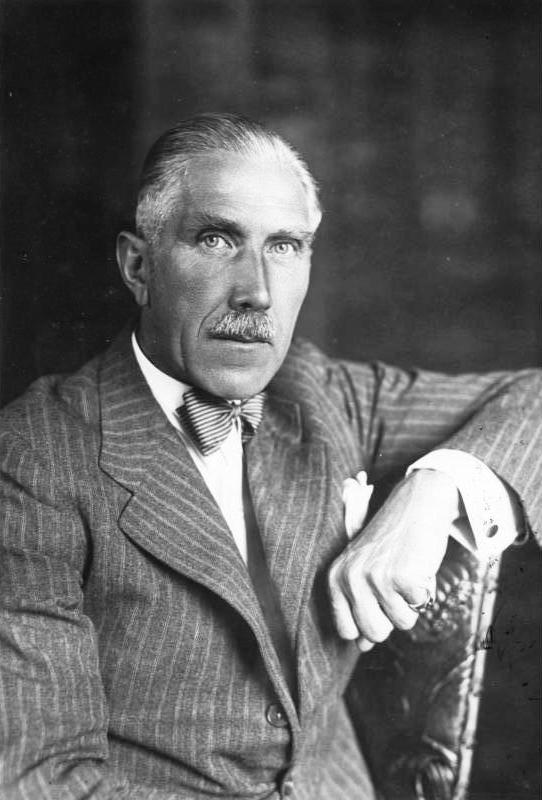 Franz von Papen Der deutsche Botschafter v. Papen, der im Auftrage der Reichsregierung in Ankara den Deutsch-Türkischen Freundschaftsvertrag unterzeichnete. Scherl Archiv [1936] [Franz von Papen (Porträt)] Abgebildete Personen: Papen, Franz von: Reichskanzler, Vizekanzler, Botschafter, Deutschland